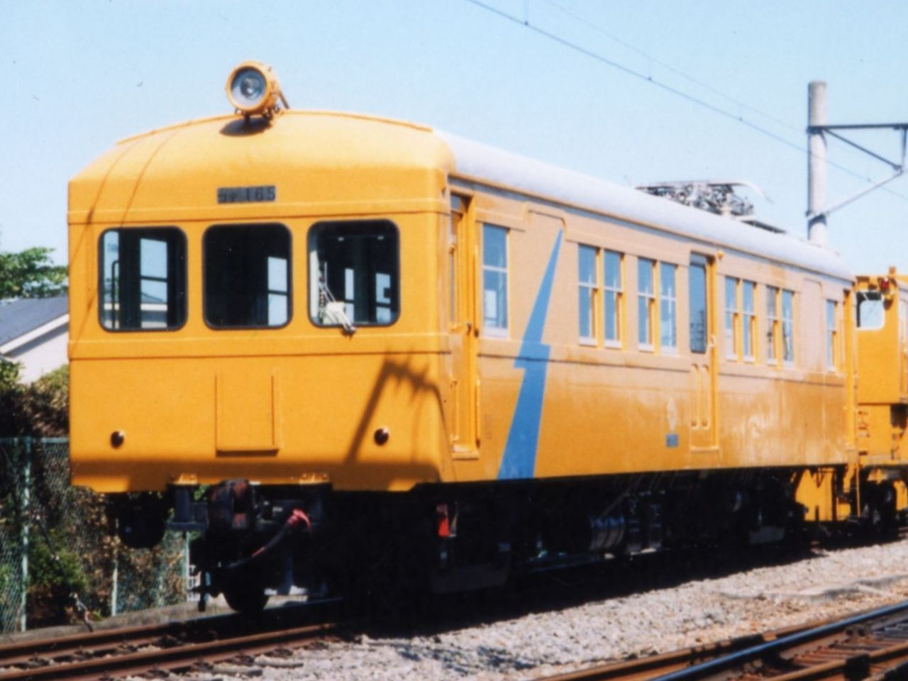 Izuhakone Kode-165 at Daiyuzan Sta.